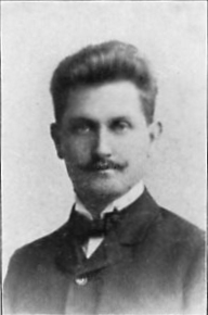 D-ro Kasimiro Bein (Kabe), L. K., vicprezidanto de l' Esperantista Societo, Varsovio.